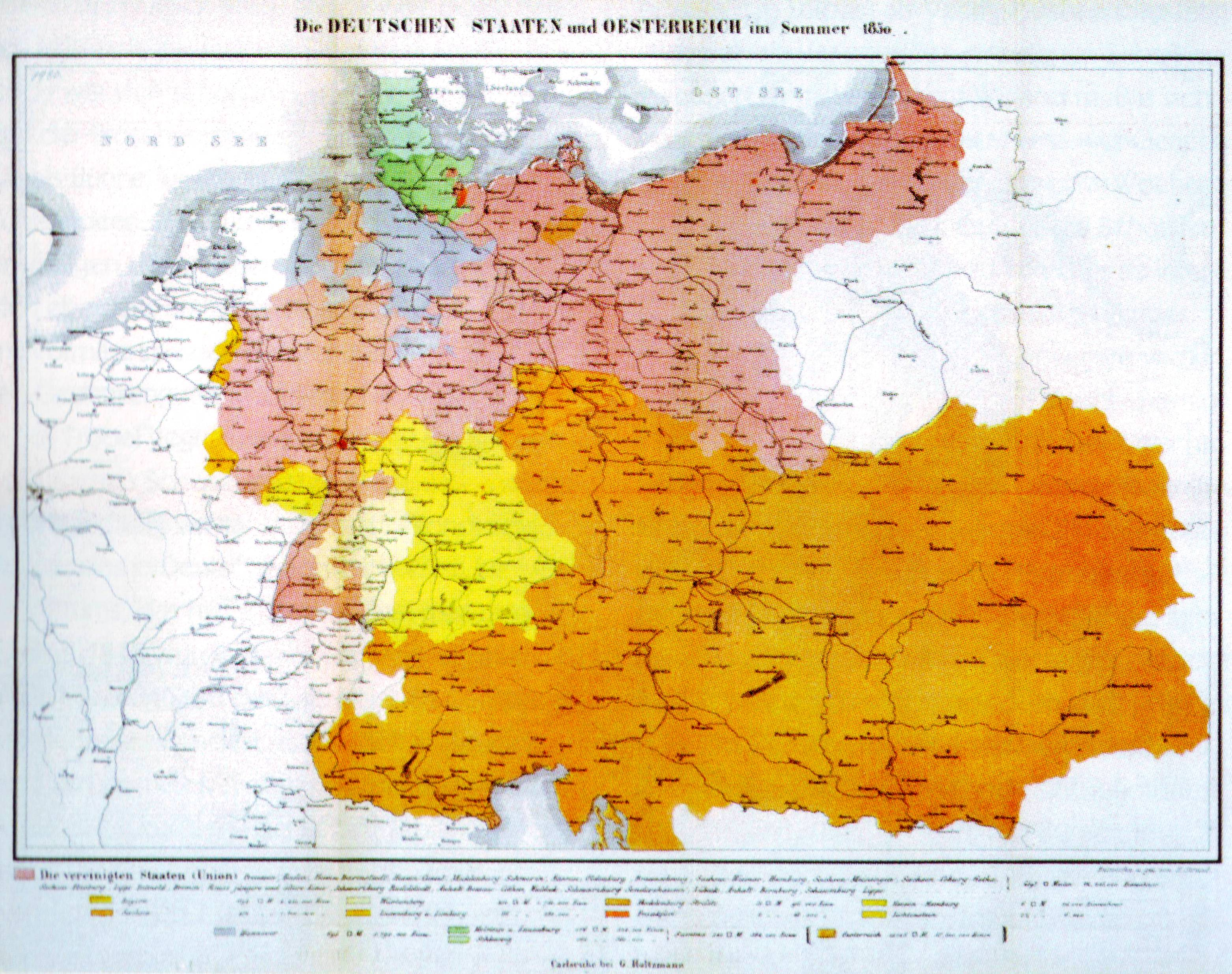 Kolorierte Lithographie. H. Straub, um 1850. Staaten des Deutschen Bundes im Sommer 1850, mit Deutscher Union.